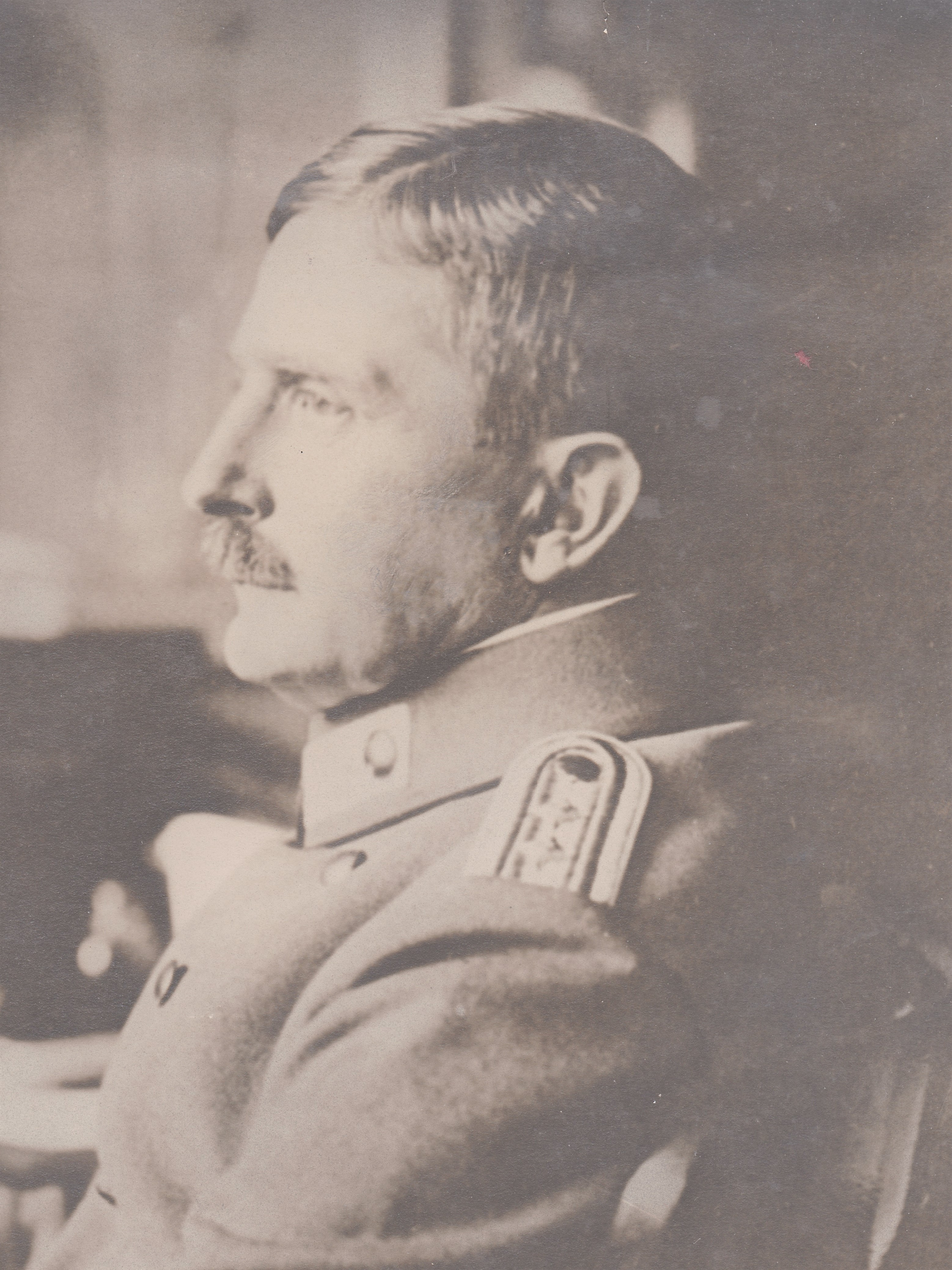 Georg Eduard Bernhard Mantius, Bergedorf, Deutschland.